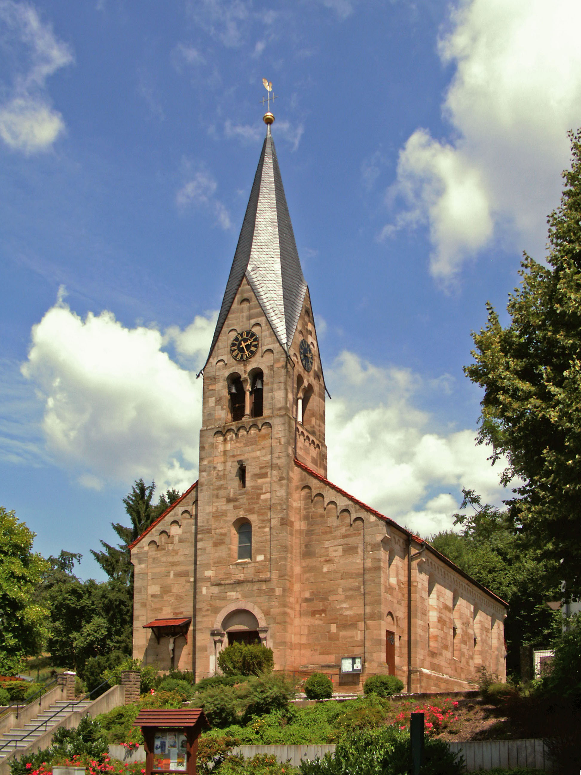 Katholische Kirche St. Laurentius in Langenhagen, Stadtteil von Duderstadt (Landkreis Göttingen)